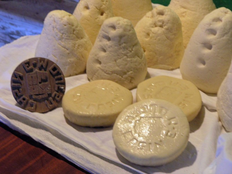 Queso casín. Producto de Asturias (España).